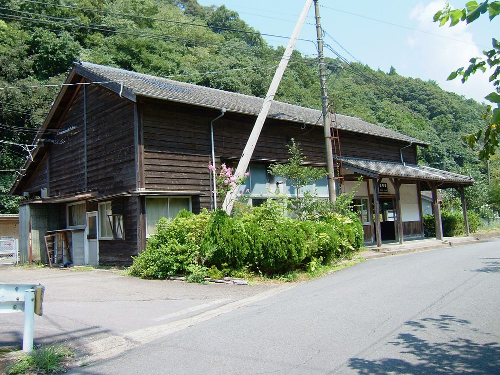 肥薩線 白石駅の駅舎。 2006年8月26日にGACHANが撮影しました。